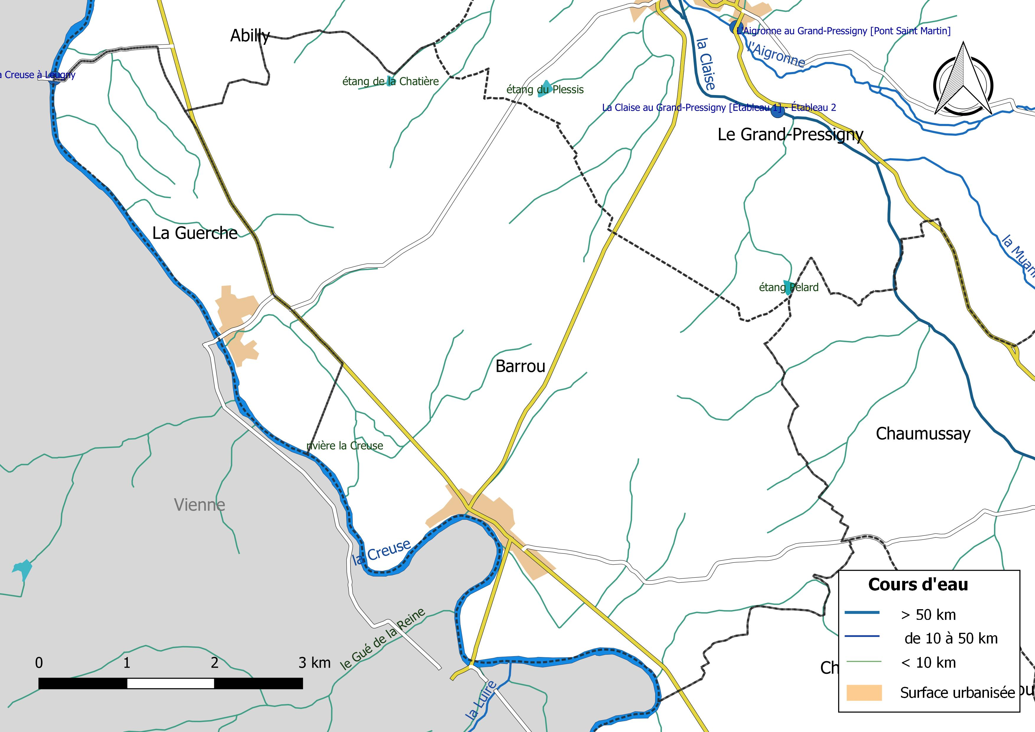 Carte du réseau hydrographique de la commune de Barrou (France).